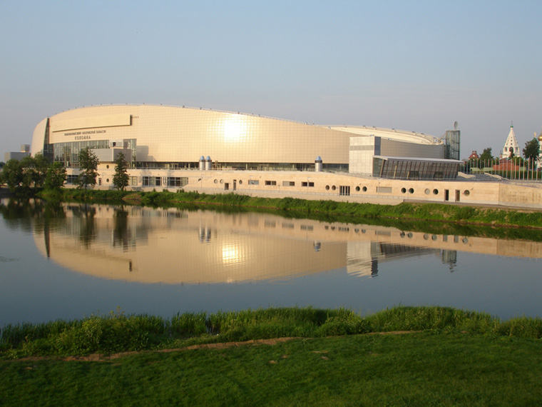 Центр конькобежного спорта в Коломне Автор Dash